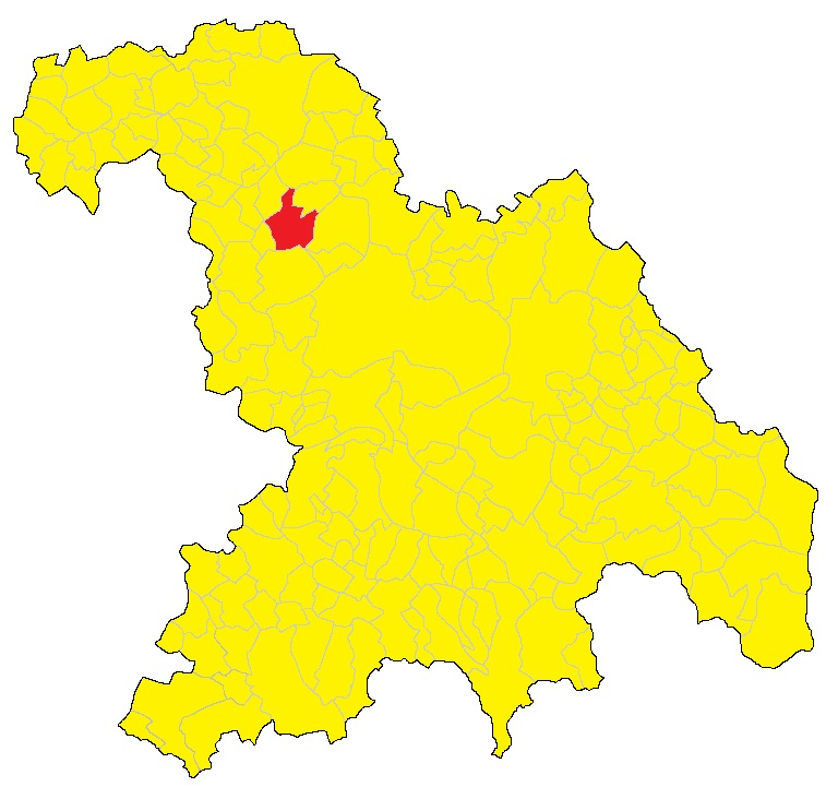 Mappa del comune di Lu (AL)